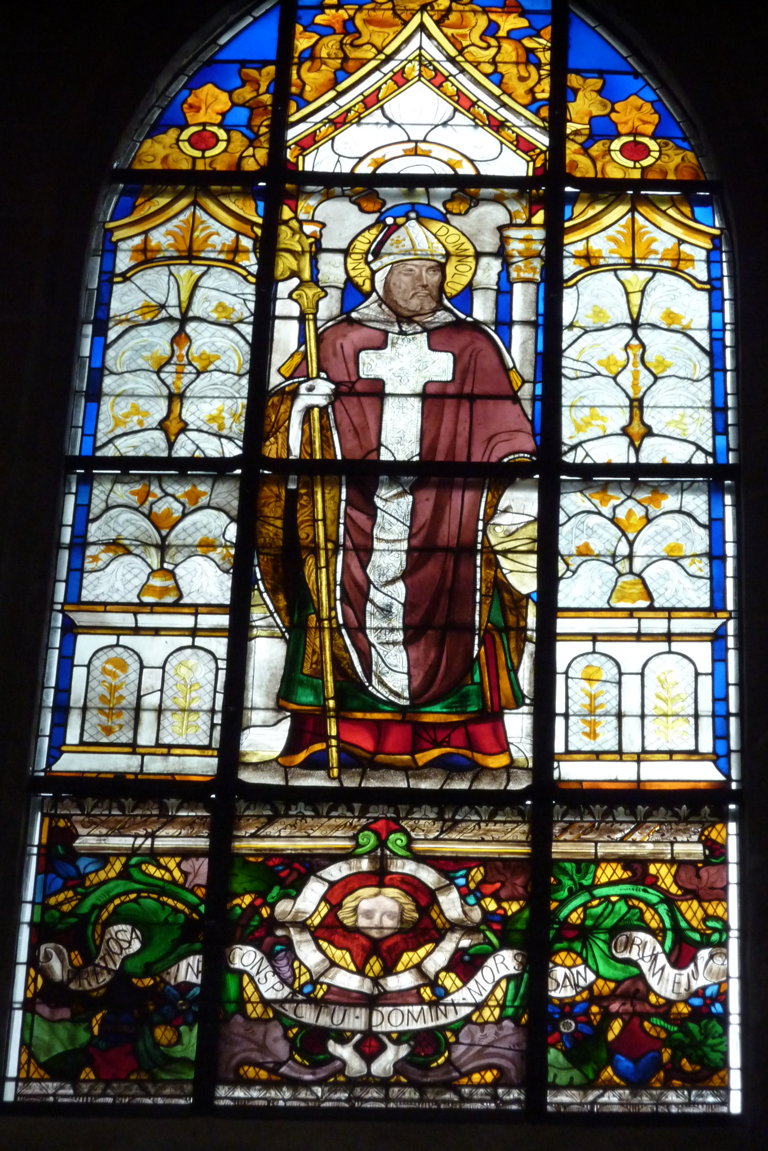 Katholische Pfarrkirche Saint-Laurent im 10. Arrondissement von Paris, Chorfenster von 1846/47 von Ernest Lami de Nozan (1801–1877) nach Kartons von Auguste-Nicolas Galimard (1813–1880); Darstellung: Heiliger Domnolus